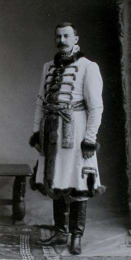 Князь Феликс Феликсович Юсупов-старший на костюмированном балу 1903 года.